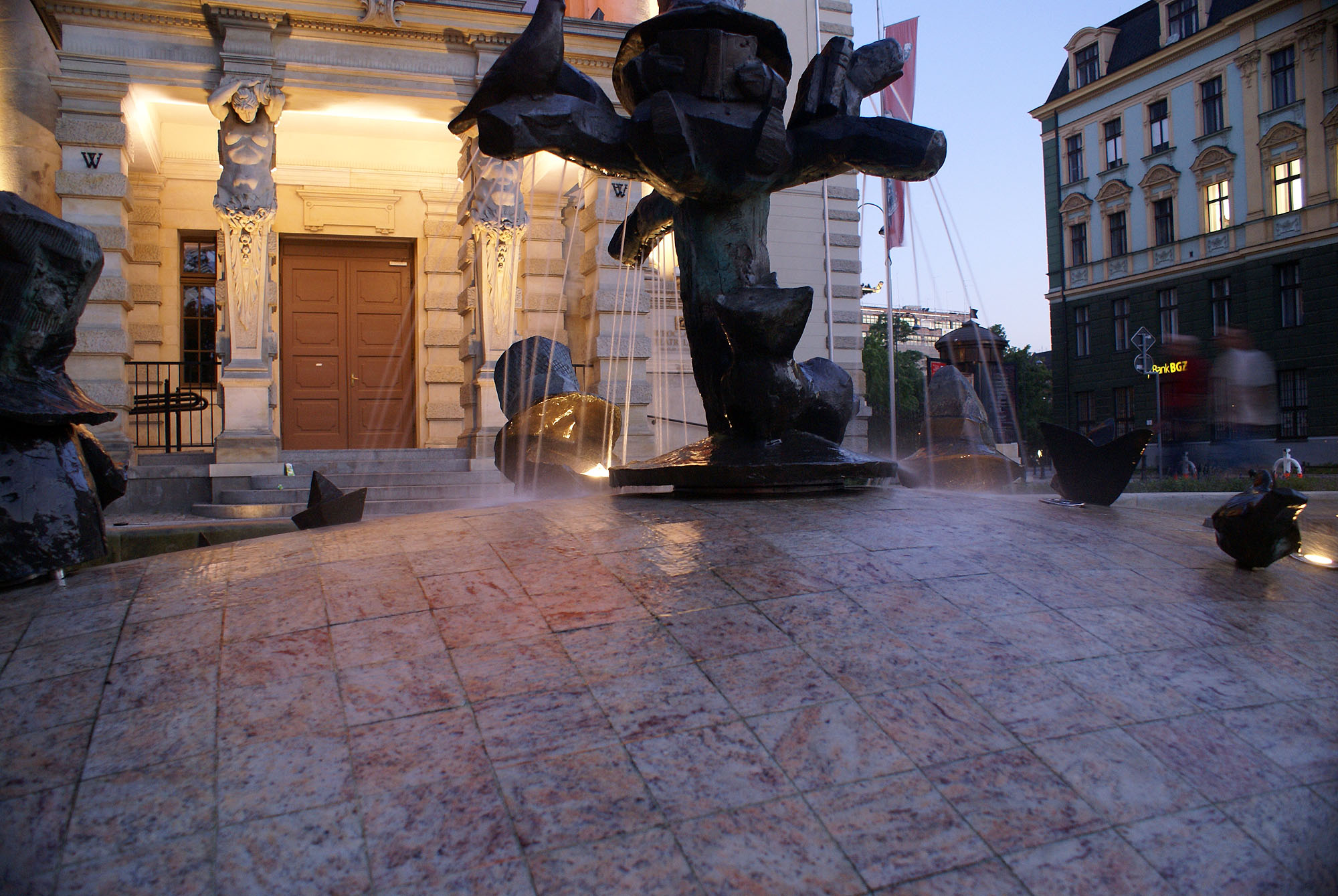 Wrocław, resursa kupiecka, 1892-1909